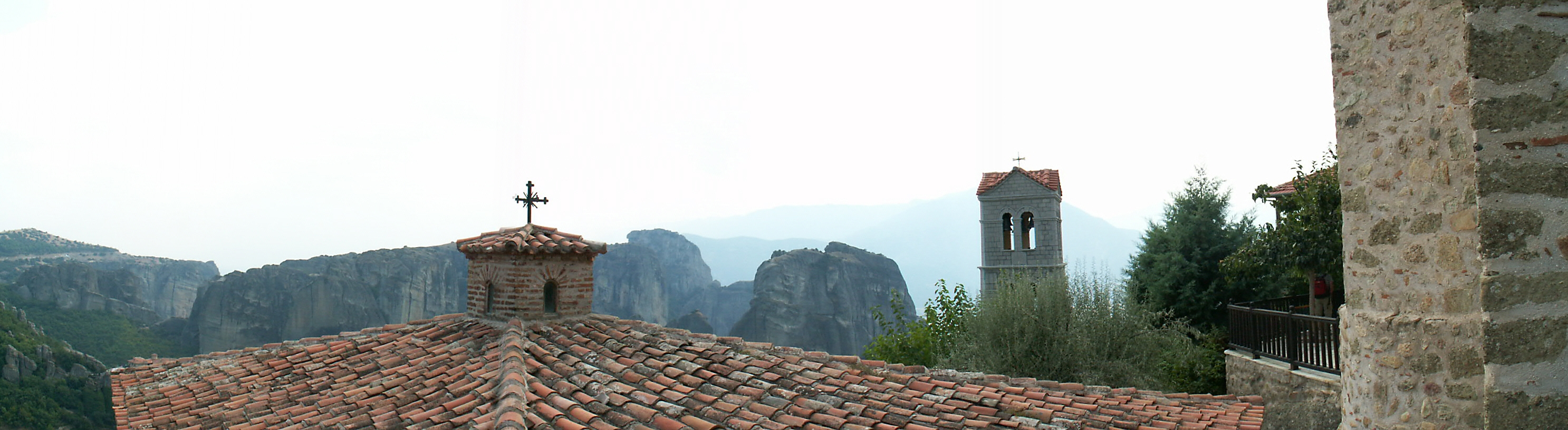 Meteora. Perspectiva inconjuratoare privita peste acoperisurile Manastirii Varlaam